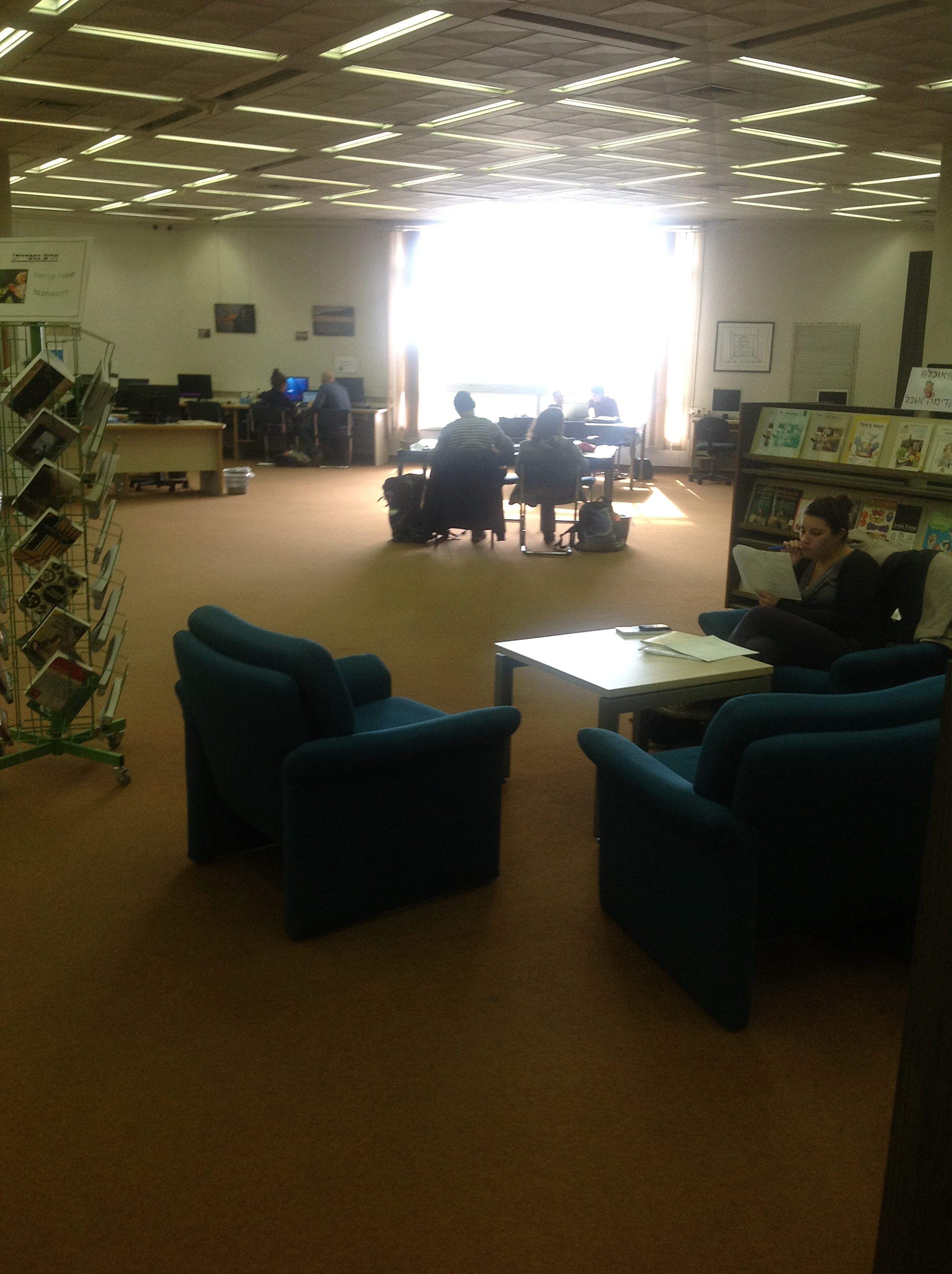 קומה 3 - דלפק השאלה, חדרי ספרניות, חדר כתבי עת ועמדות מחשבים